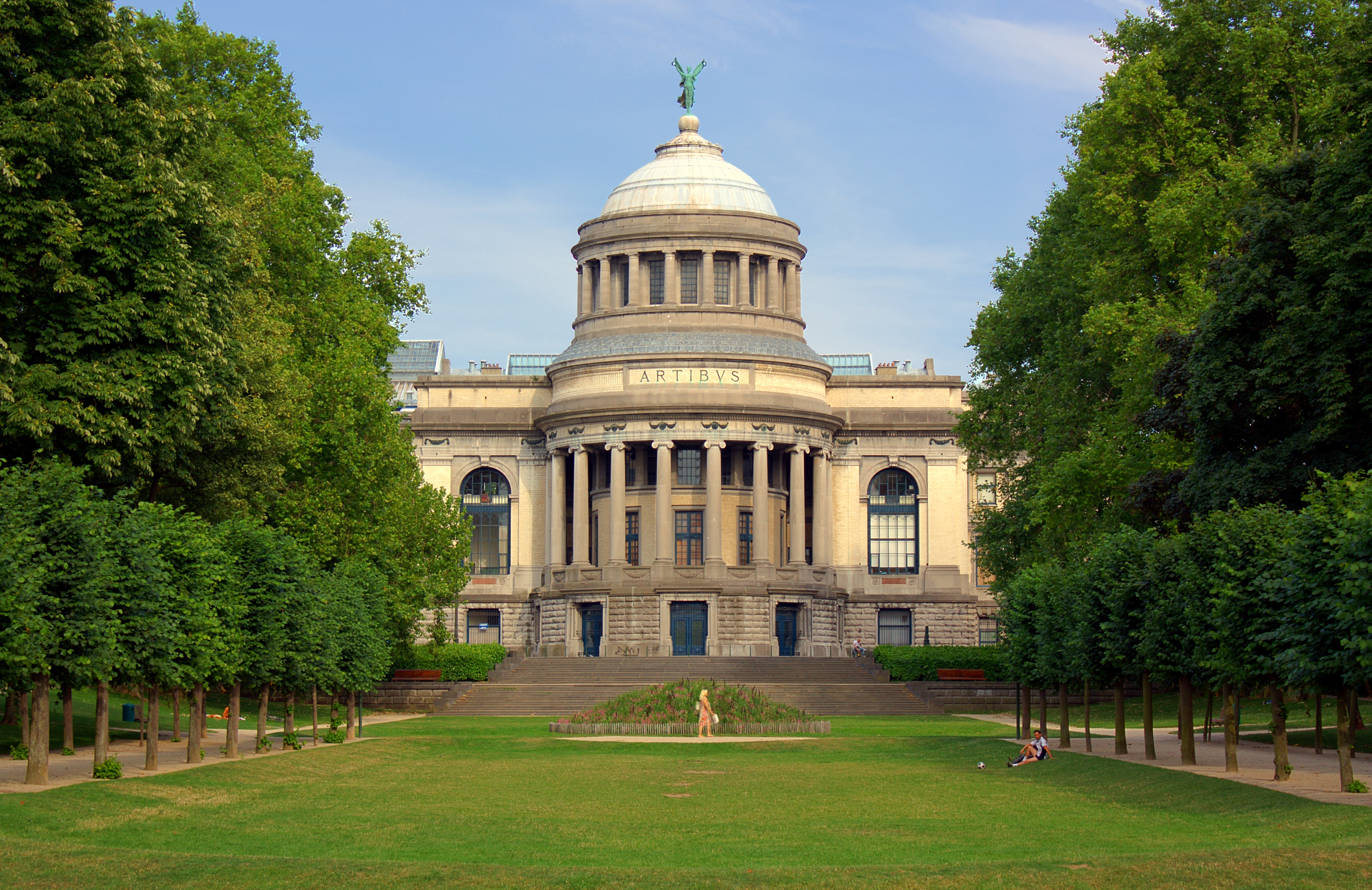 Museum royal d'Art et d'Histoire situé dans le parc du Cinquantenaire. Rendu HDR à l'aide du logiciel Qtpfsgui.